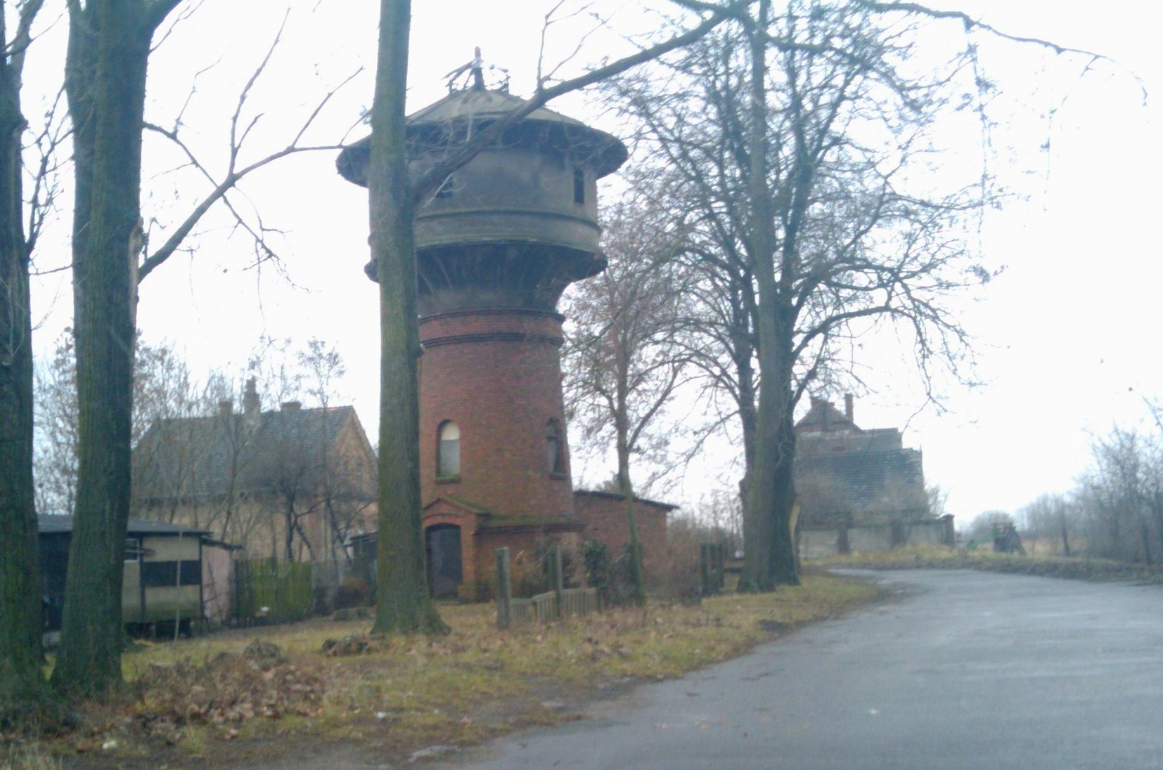 Wieża ciśnień na granicy Brzóstowni, Radoszkowa i Kiełczyna, w okolicy stacji kolejowej Książ Wielkopolski, powiat Książ Wielkopolski, Wielkopolska.